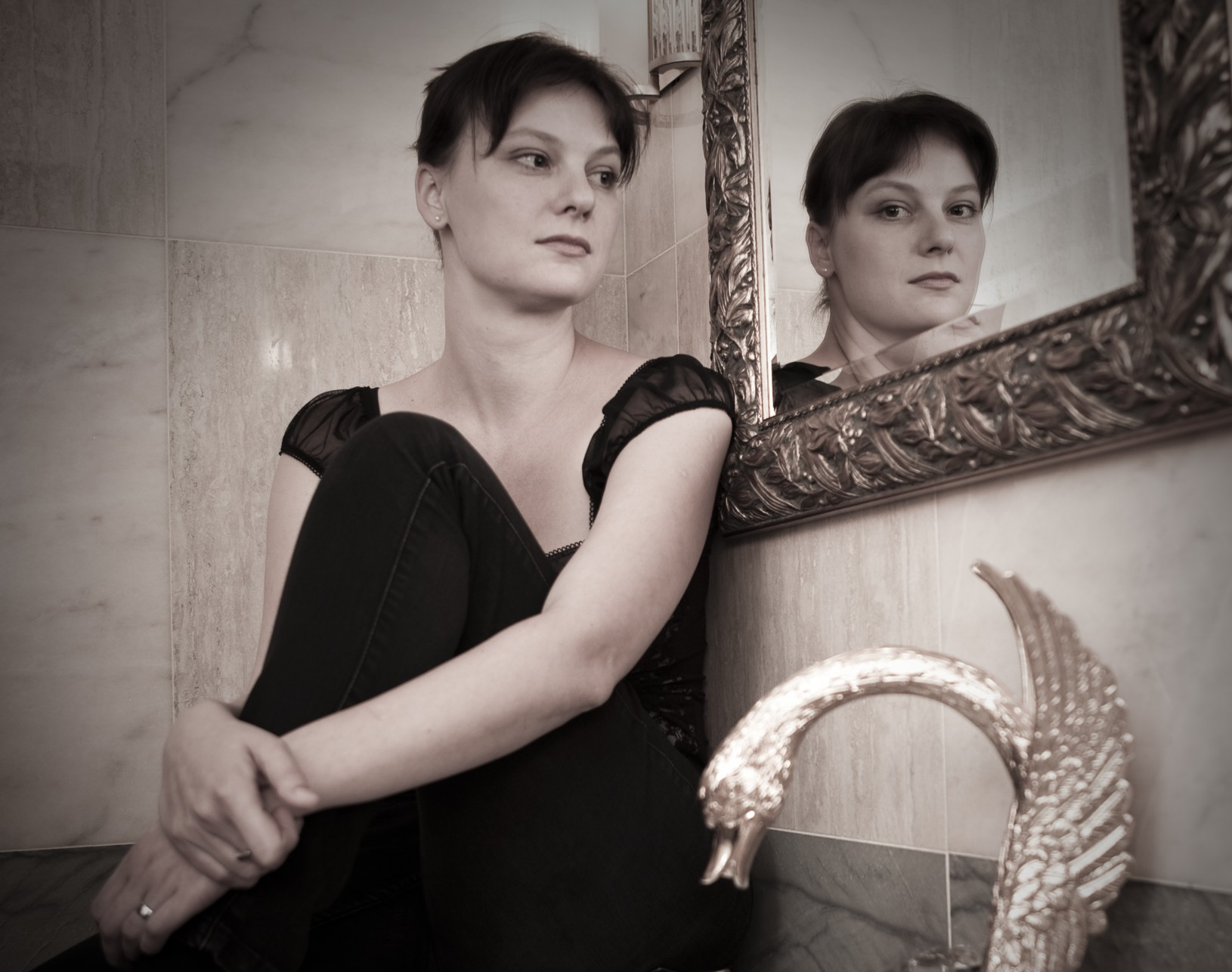 Kateřina Rudčenková, 2010